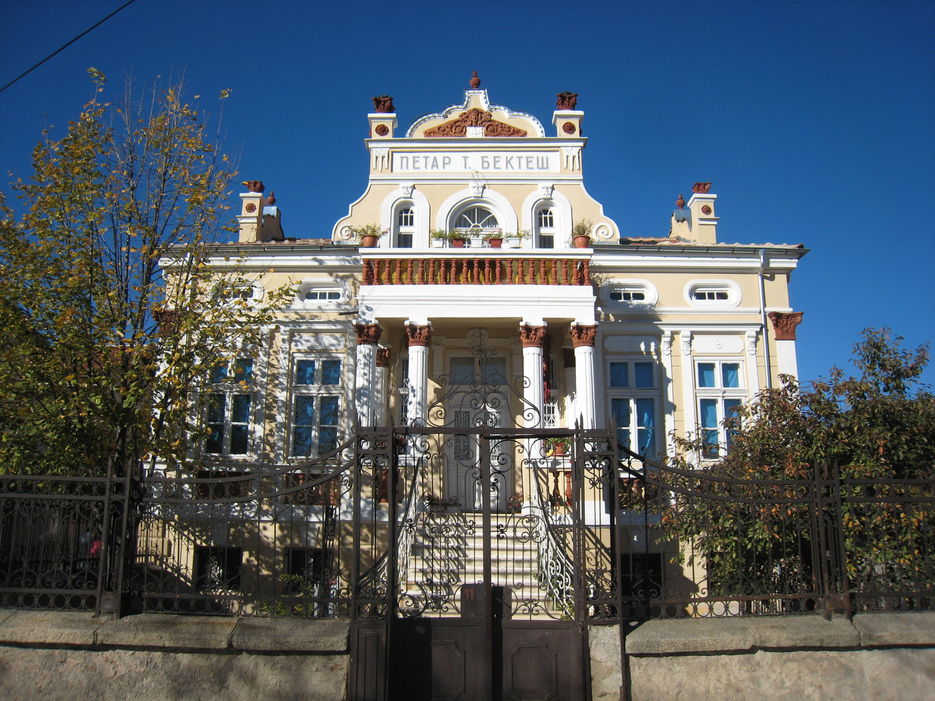 Прилепска архитектура, куќа од 1923 година.